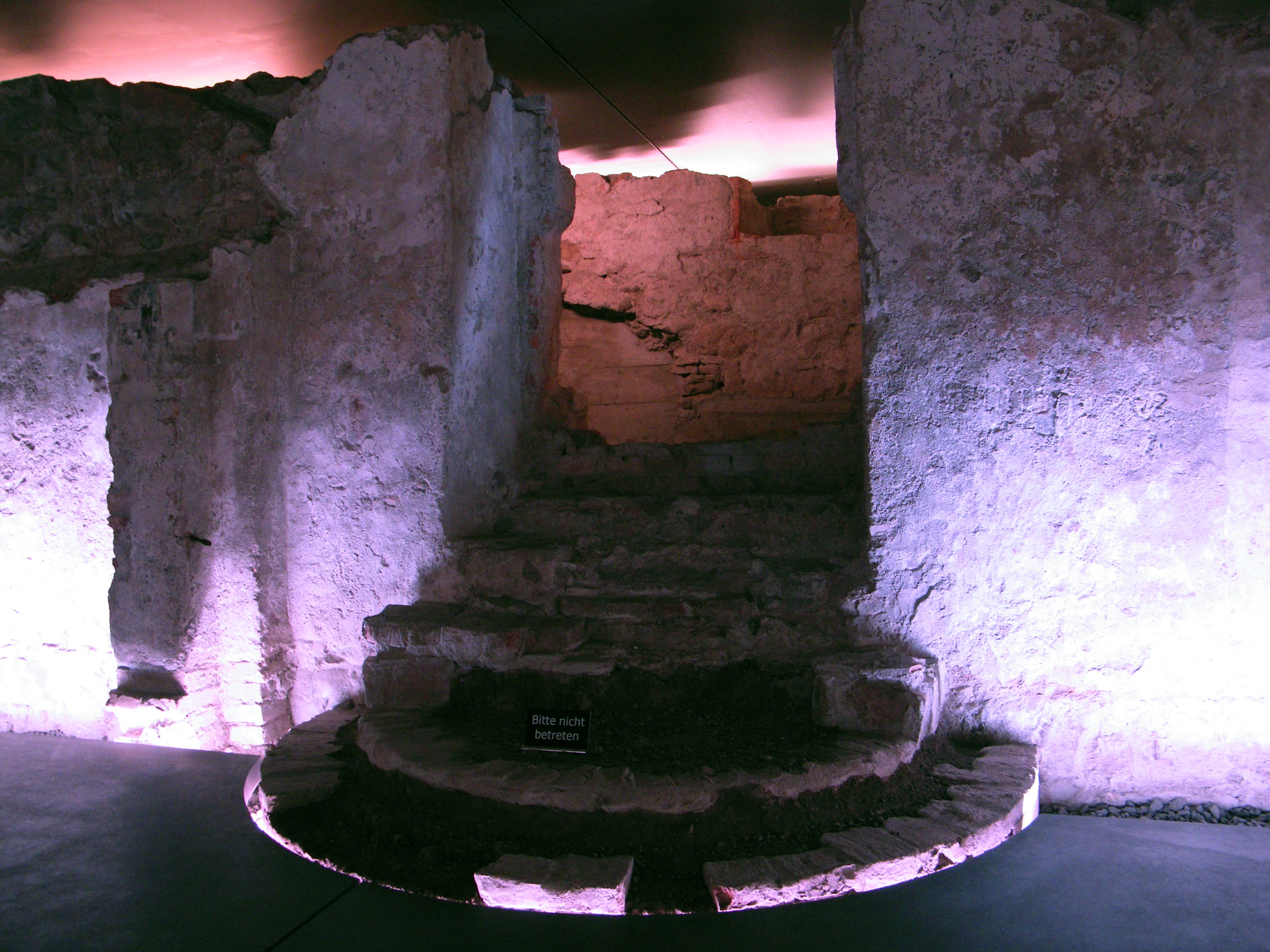 Erasmuskapelle Kempten